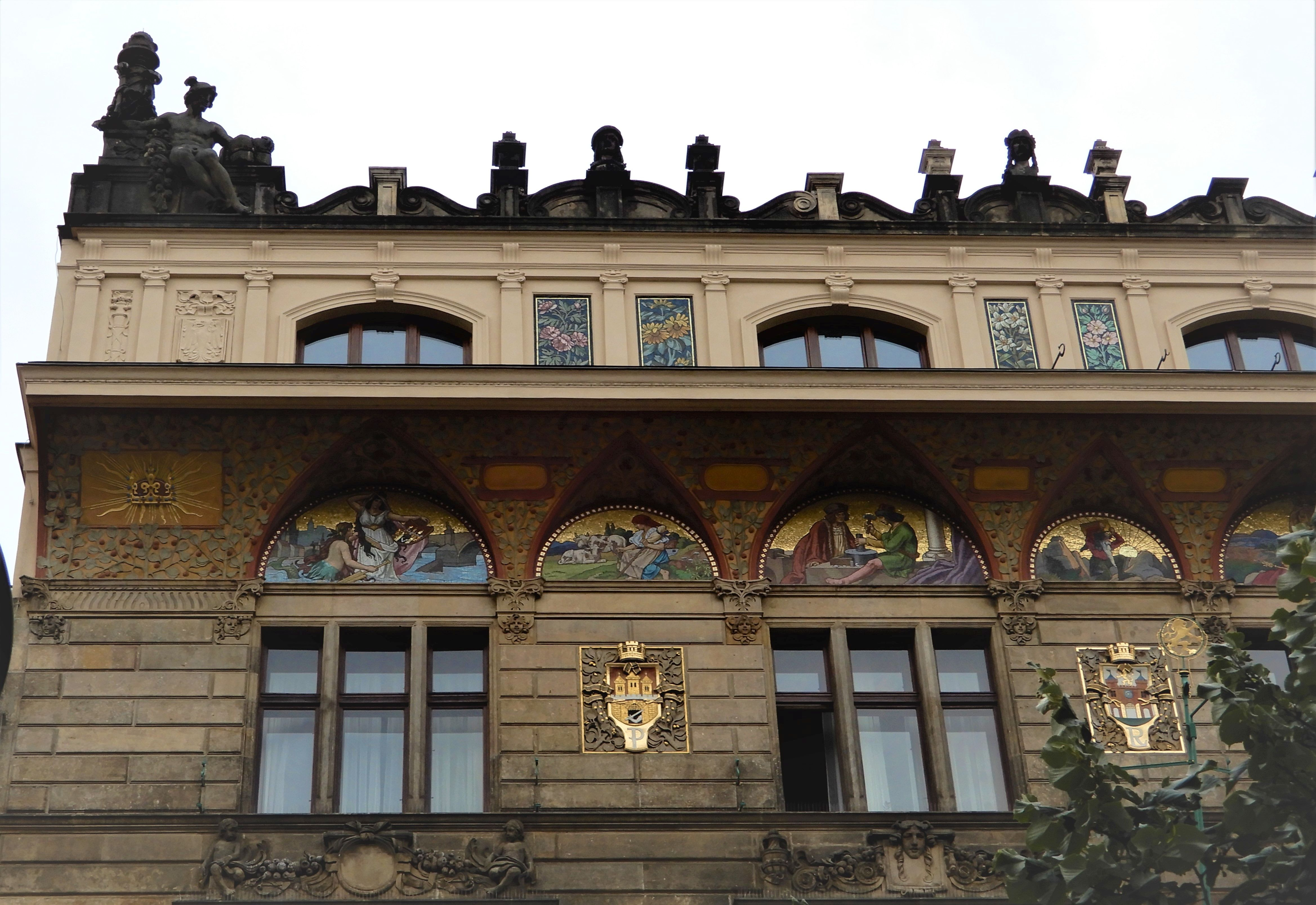 Landbank of the Bohemian Kingdom, Cons. Nr. 858-II, Na Příkopě 20